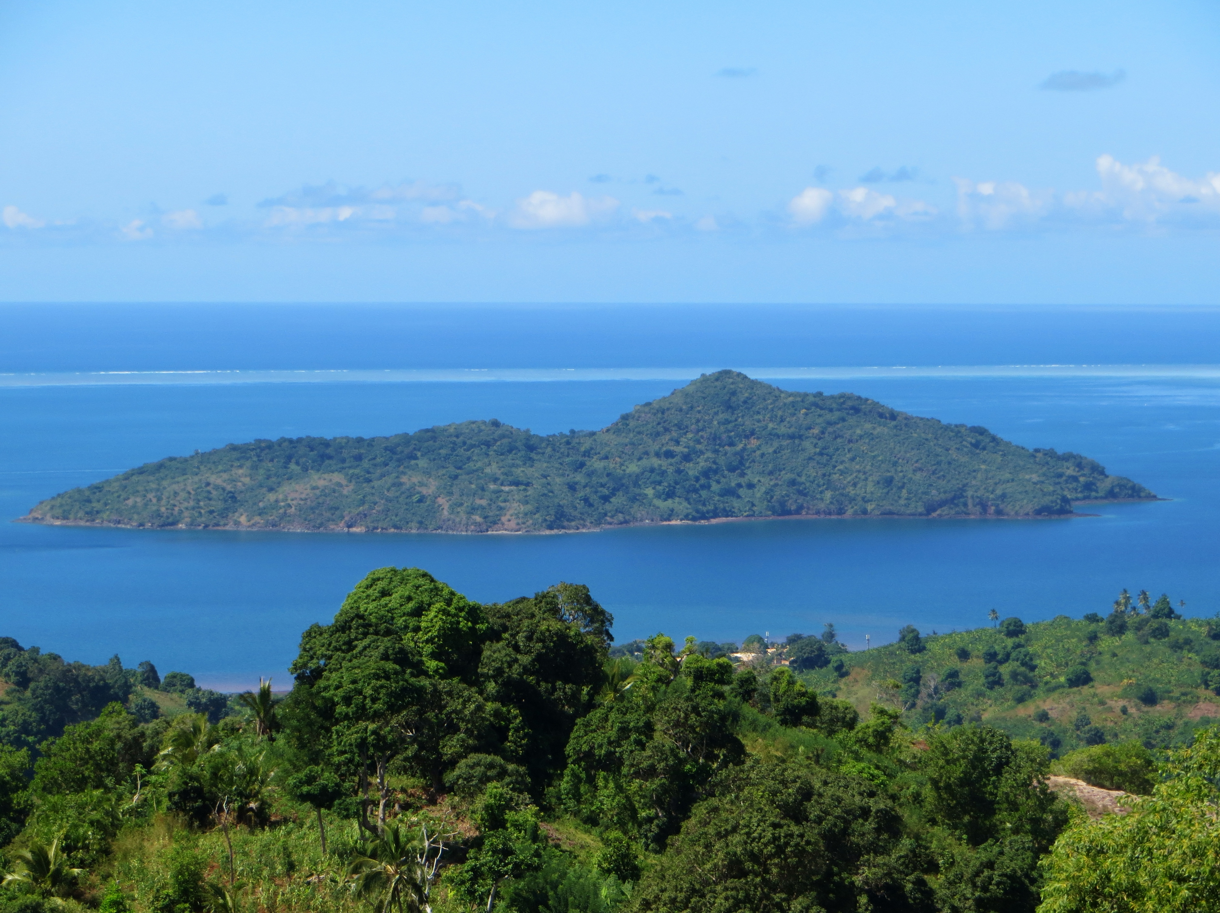 L'îlot M'Bouzi ("Chissioua Mbouzi") à Mayotte, vu depuis les hauteurs des padzas de Vahibé (près de Passamaïnty).